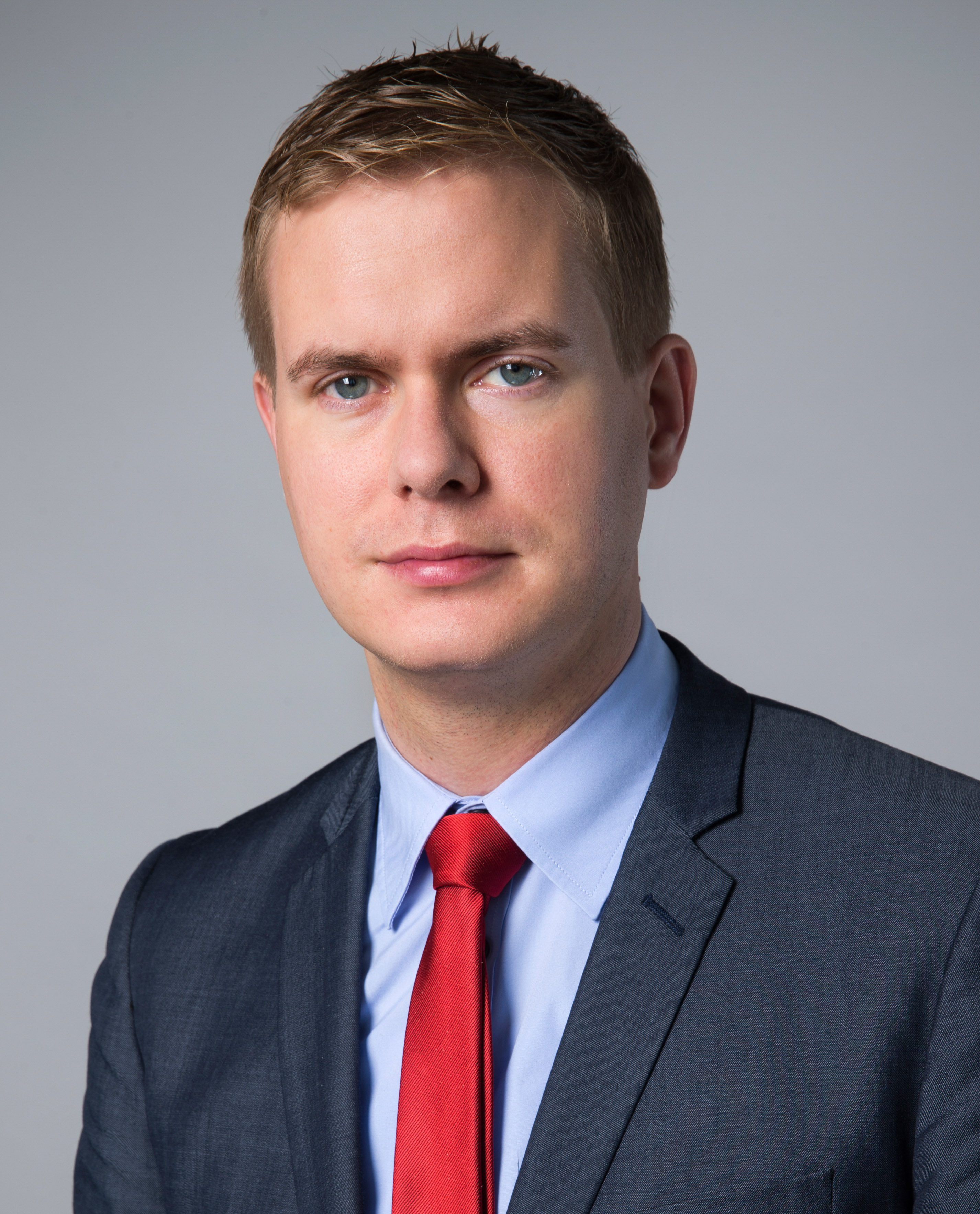 Gustav Fridolin (MP), Utbildningsminister i Regeringen Löfven.